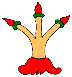 Glifo de Chilcuautla